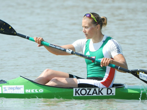 Kozák Danuta a 2013-as Kajak-kenu Világkupán (Szeged)